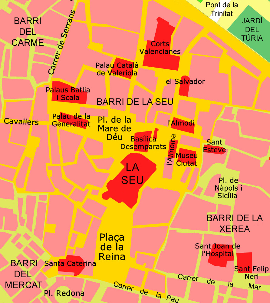 Planol Seu València